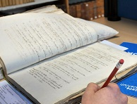 Catalogue sans nom (Titre donné par le service de l'Université de Bordeaux) Liste des ouvrages, recueils, thèses compilés par Jules Houël de 1823 à 1886.